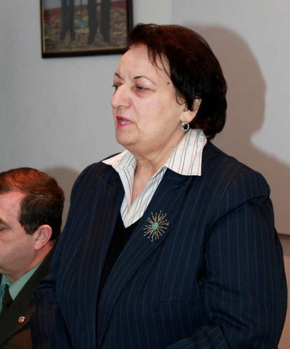 Омбудсмен Азербайджана, Эльмира Сулейманова